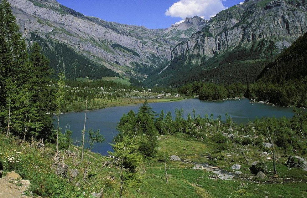 Lac de Derborence 2006